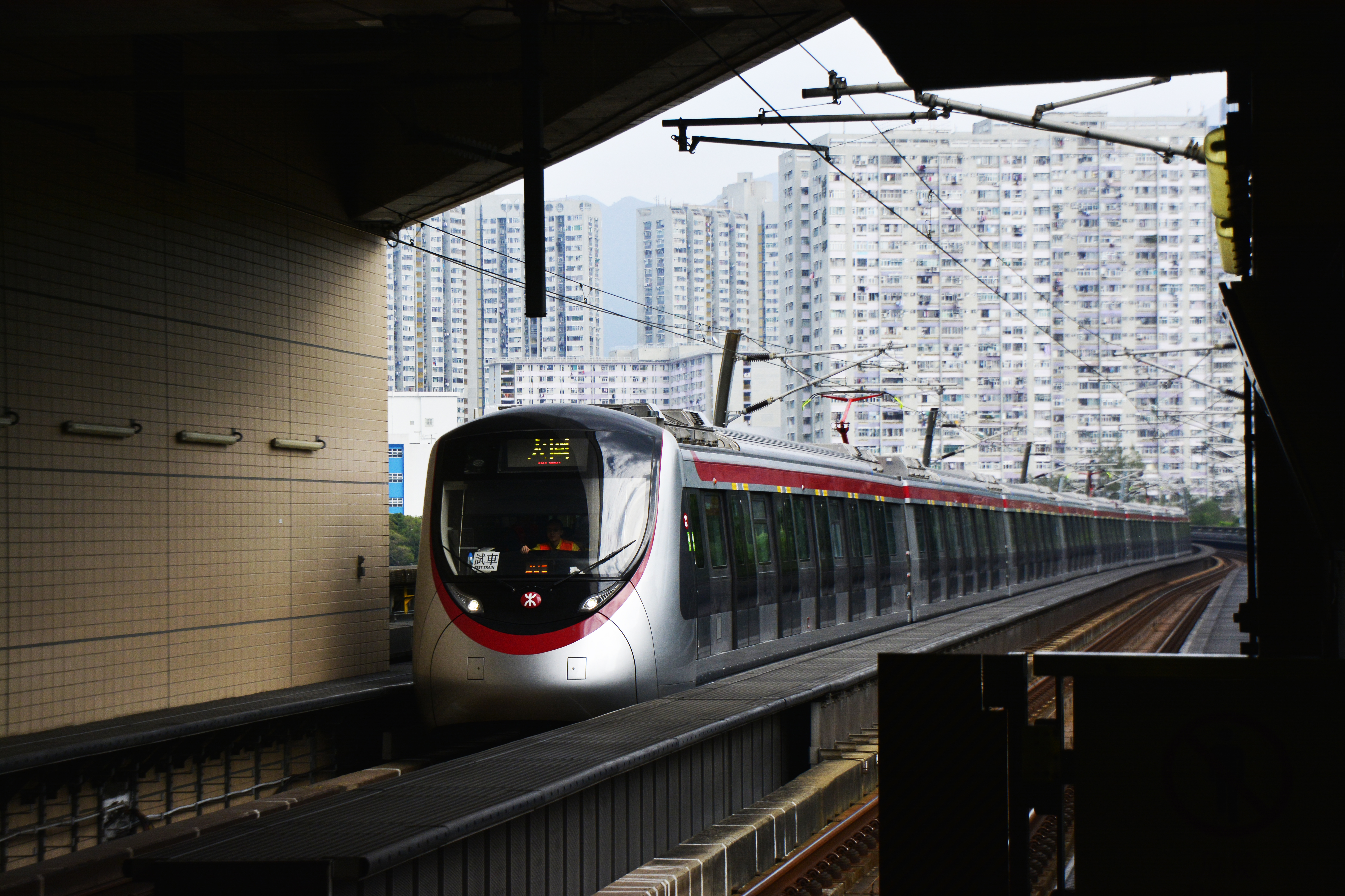 一列馬鞍山綫中國製8卡列車正進入車公廟站